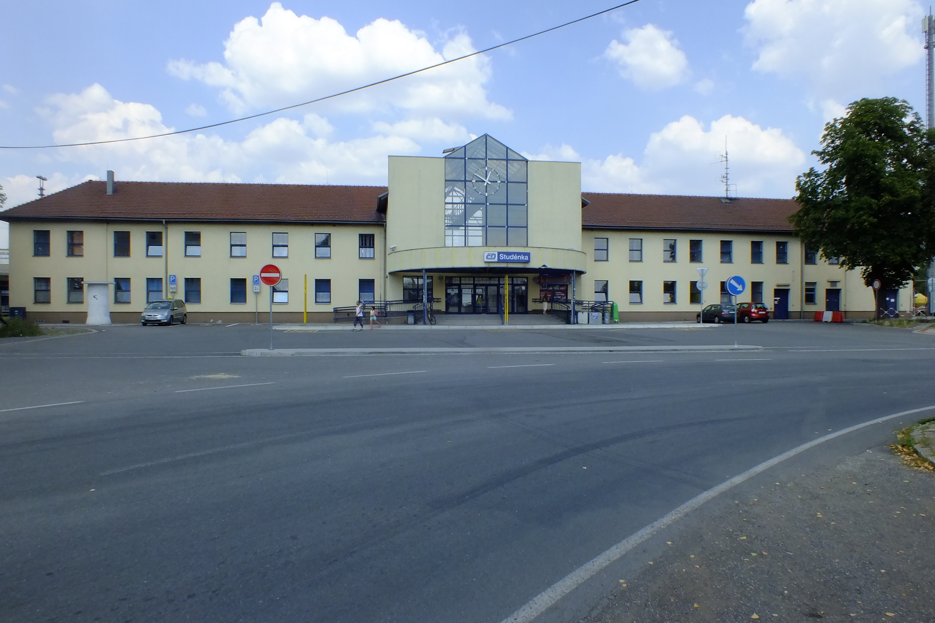 Pohled na staniční budovu z ulice